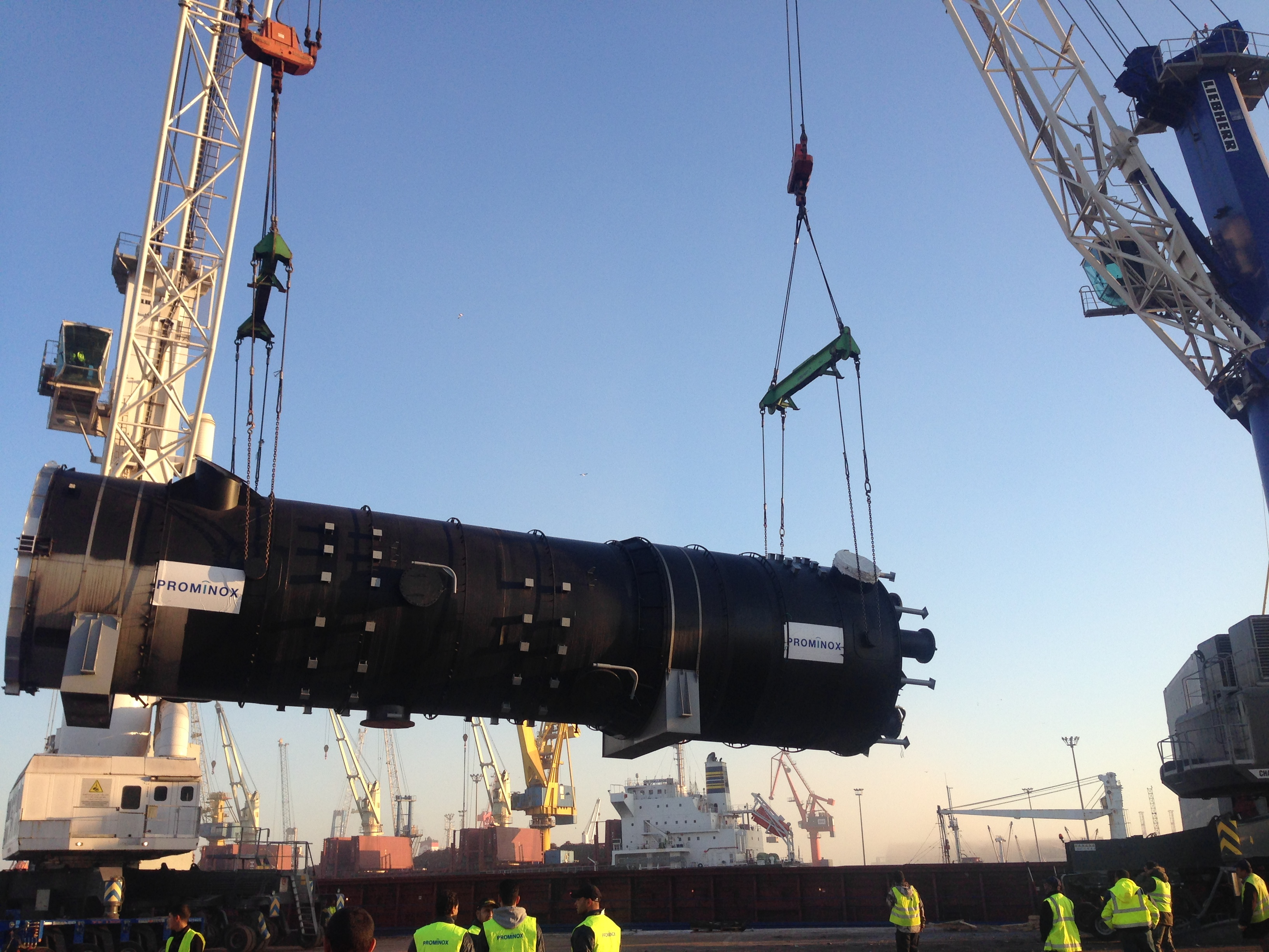 Export vers l'Europe d'équipements industriels.